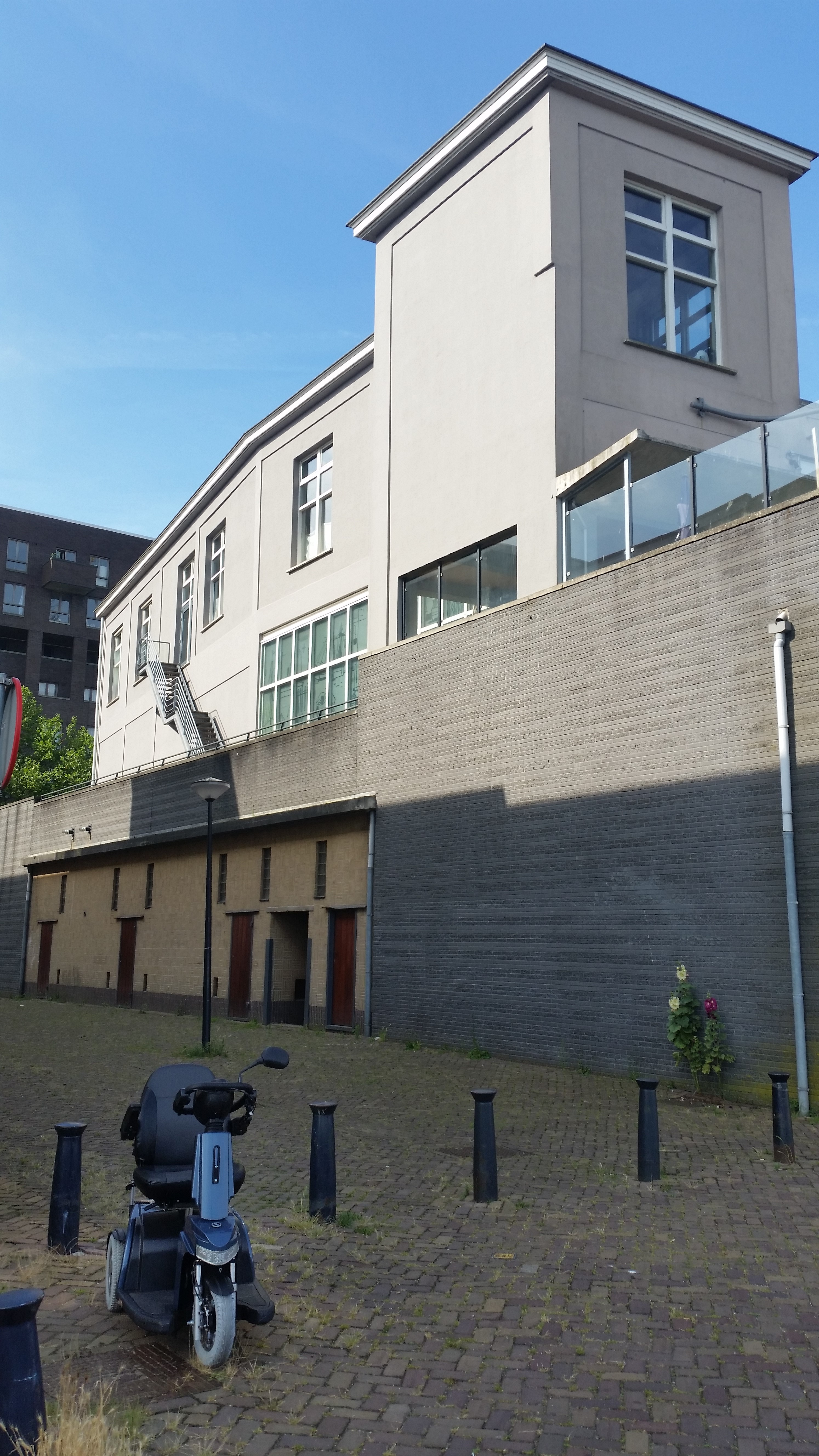 Loods 6, zijde Messinastraat